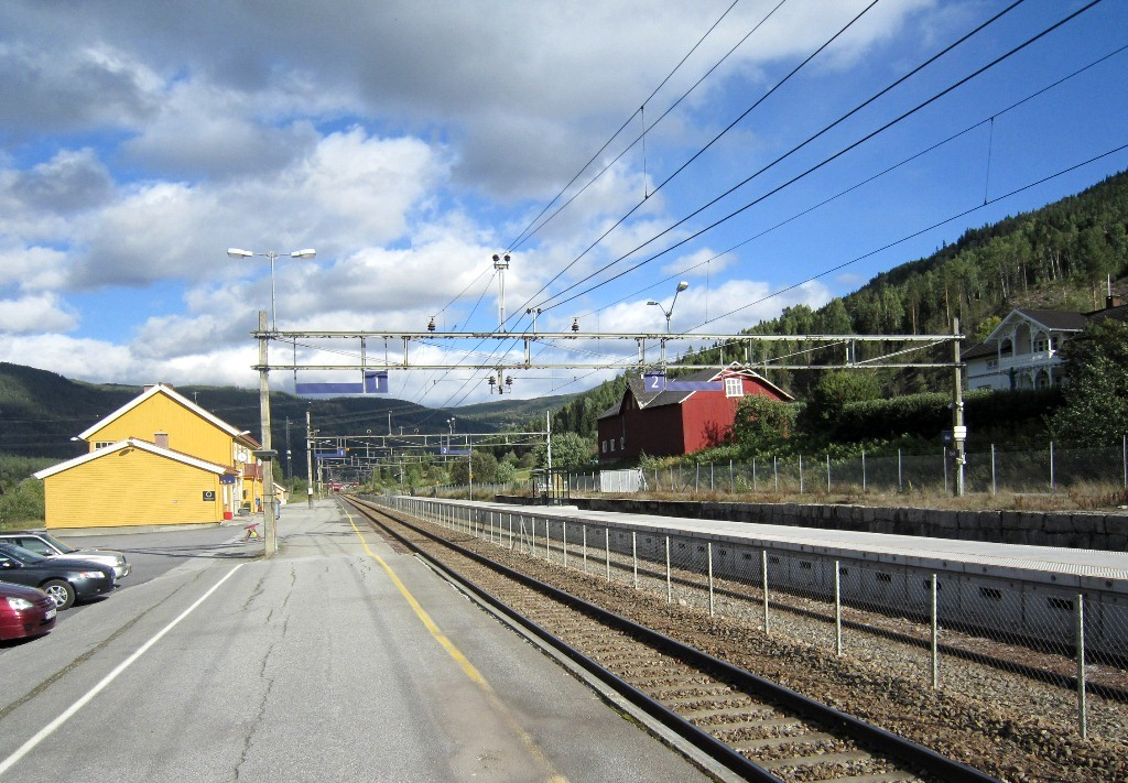 Gol stasjon på Bergensbanen